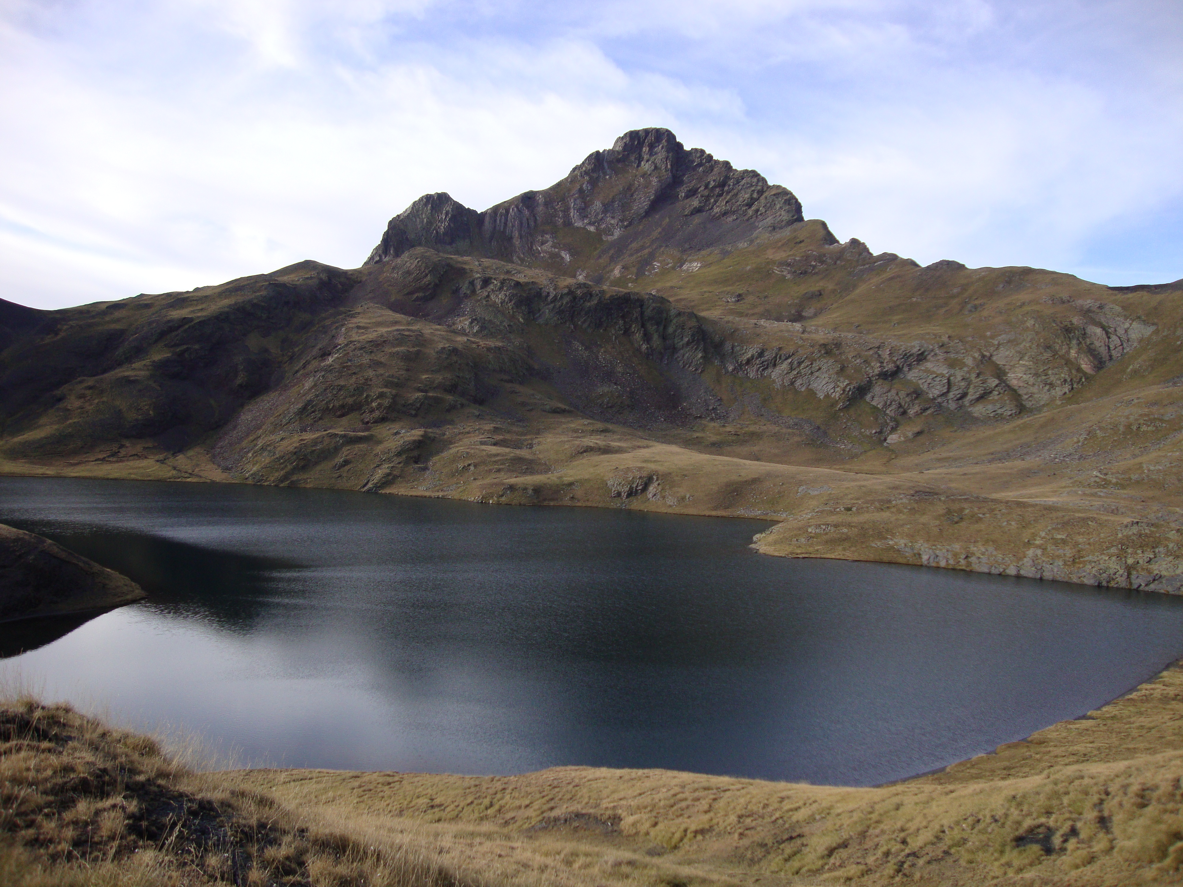 Lac de Montoliu e Tuc de Mauberme